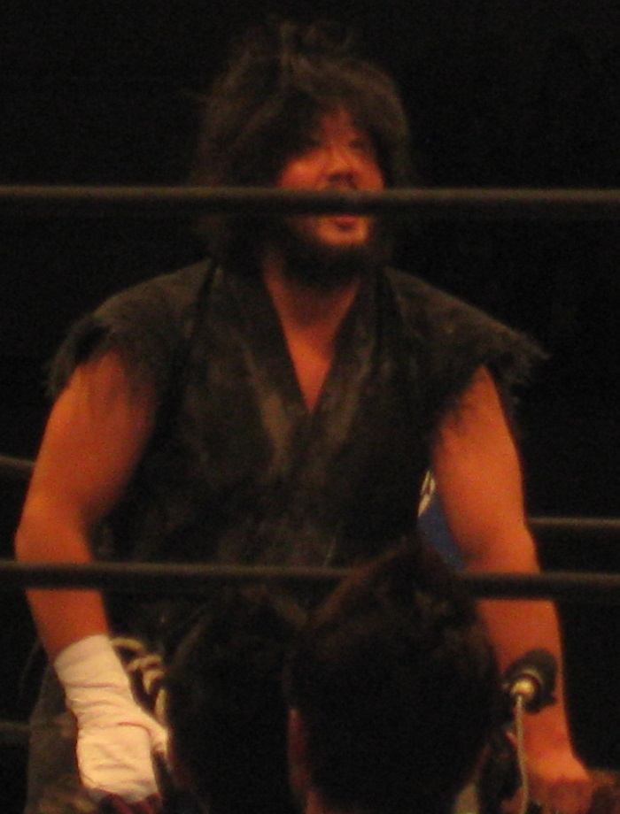 2011年11月12日 大阪府立体育会館 「POWER STRUGGLE」 ヒデオ・サイトー